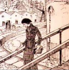 A poetisa brasileira Cecília Meireles desembarcando em Lisboa. Bico de pena de Fernando Correia Dias (marido de Cecília). Outubro de 1934.